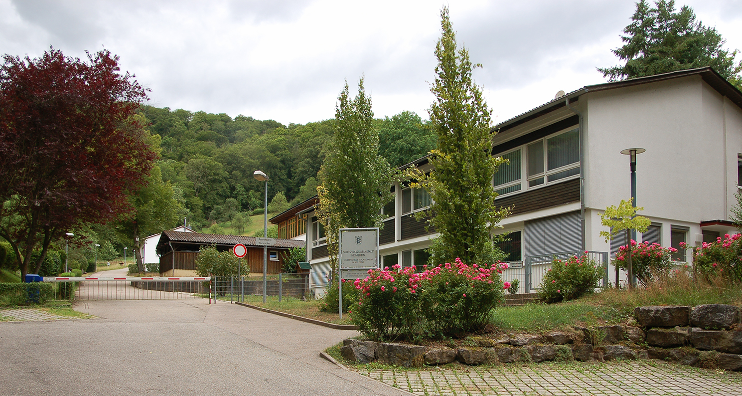 Empfangsgebäude im Kelterle am Bromberg: Erst Kinderheim, dann Außenstelle der Justizvollzugsanstalt Heimsheim und seit Mai 2015 Justizvollzugsschule des Landes Baden-Württemberg